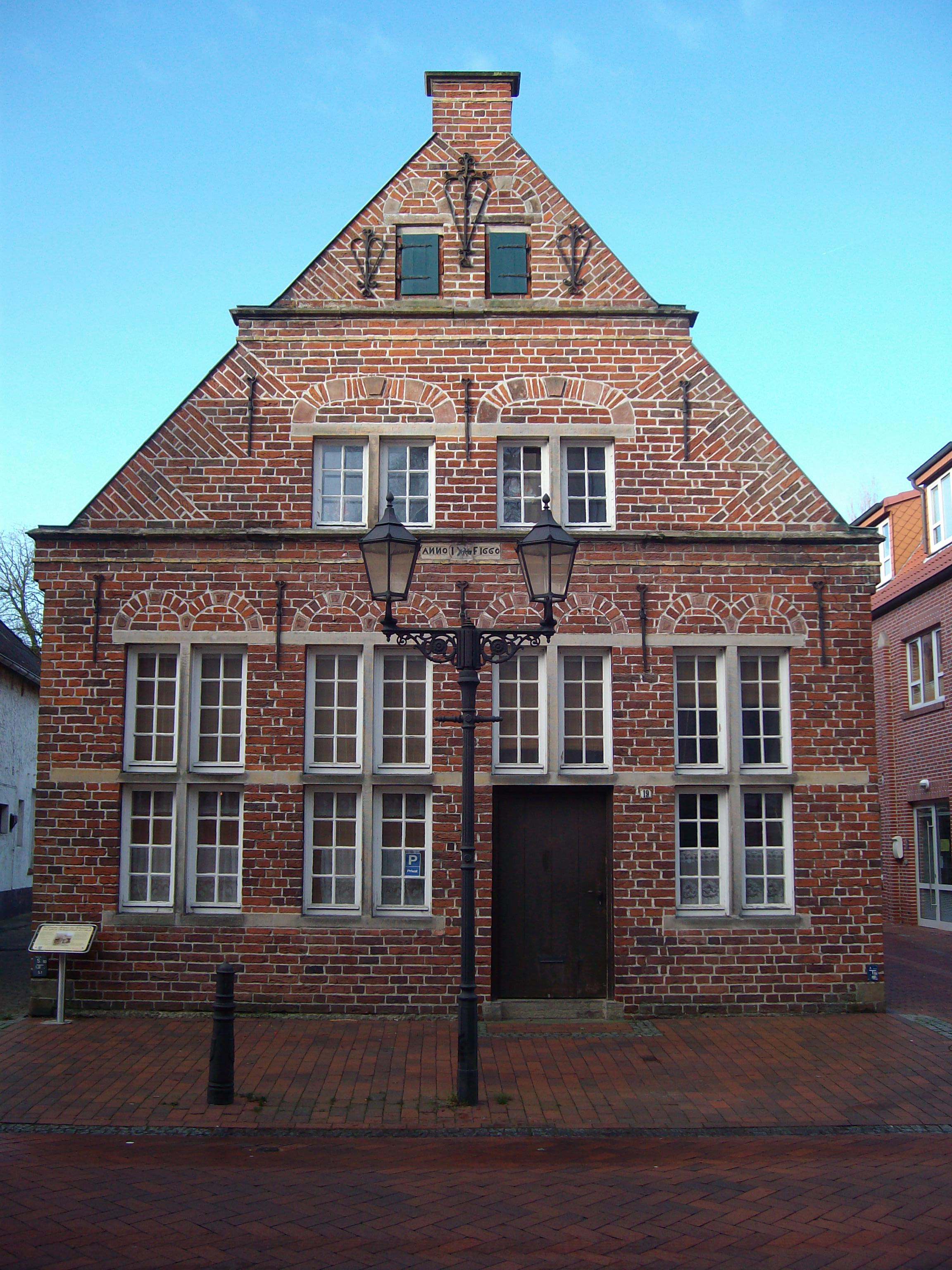 Fronehaus, Norderstraße 19 in Weener, Ostfriesland